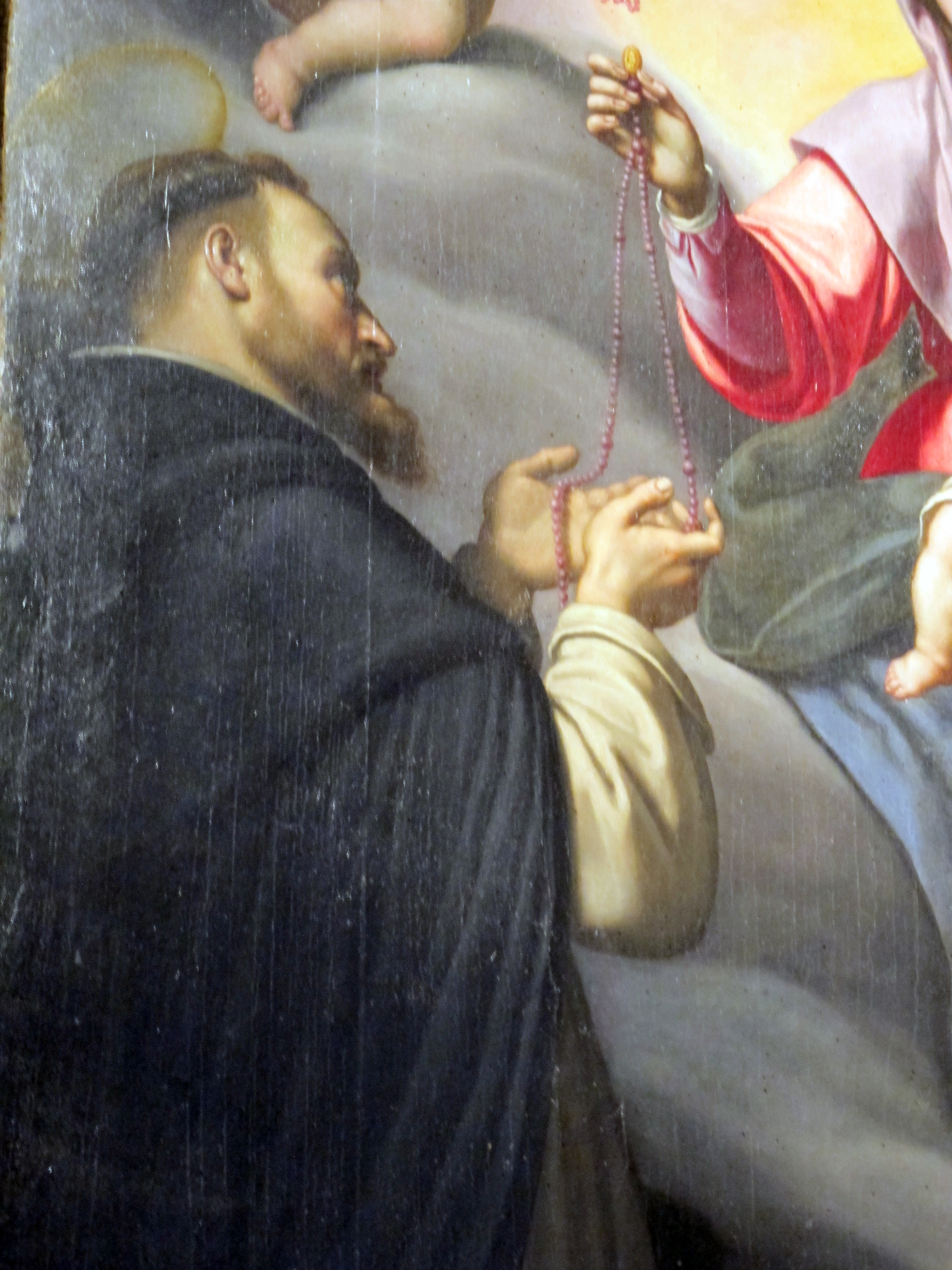 Pieve di San Giovanni Decollato - Montemurlo